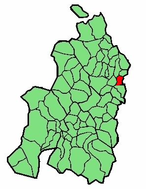 aipaturiko udalerriaren kokapena Nafarroa Beherean